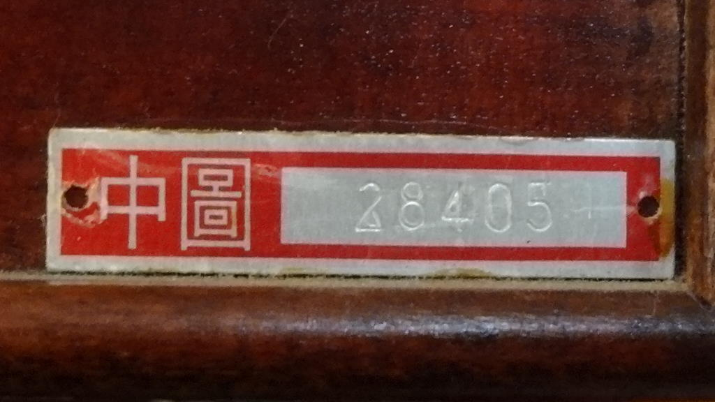 國立中央圖書館財產標示牌